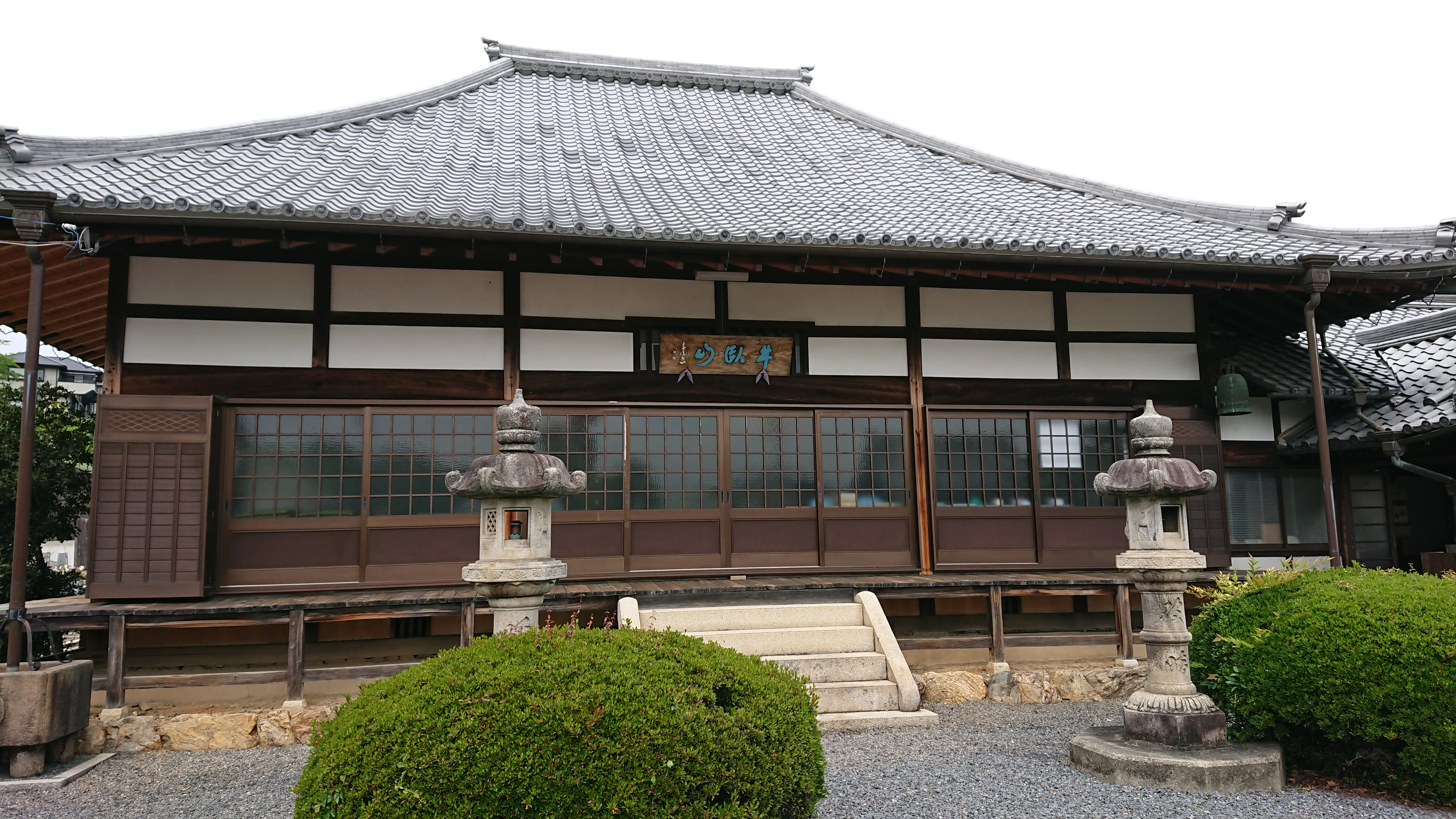 林昌寺の本殿を正面から撮った写真